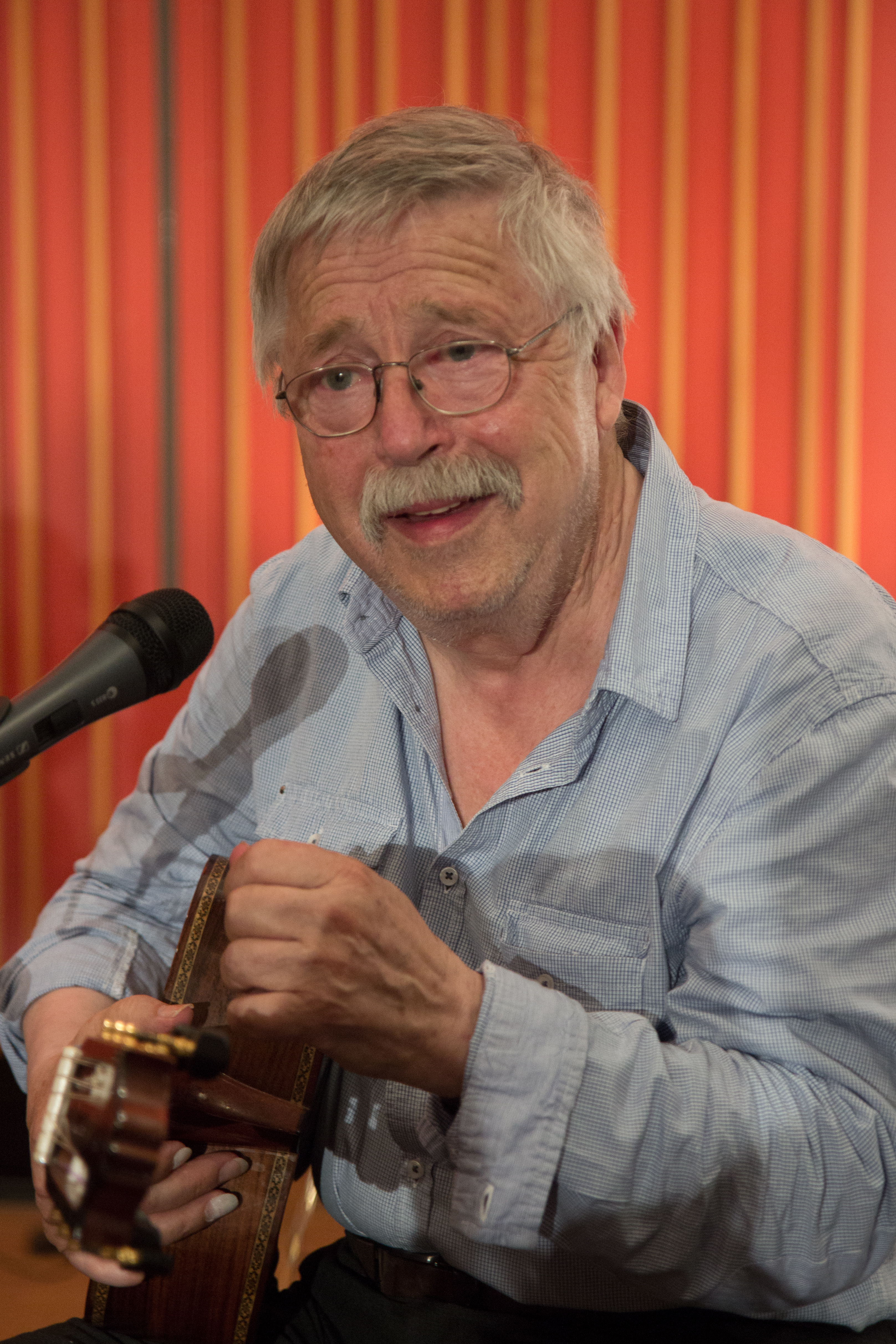 Der Liedermacher Wolf Biermann beim Hausacher Leselenz 2013